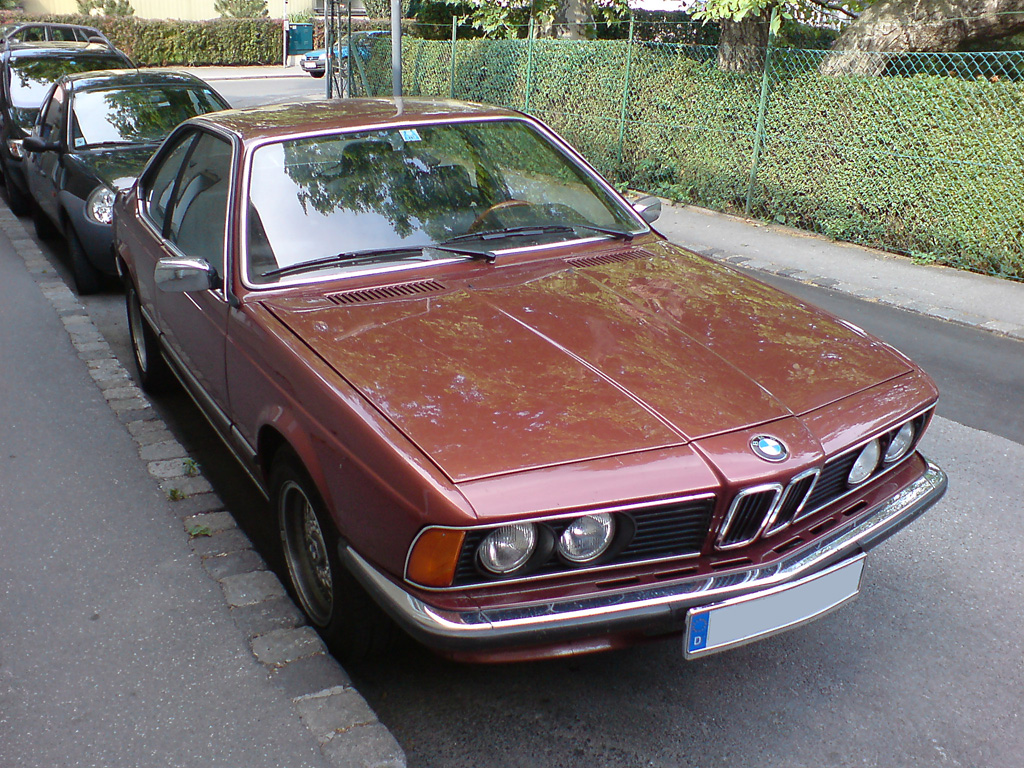 BMW 633 CSi Front